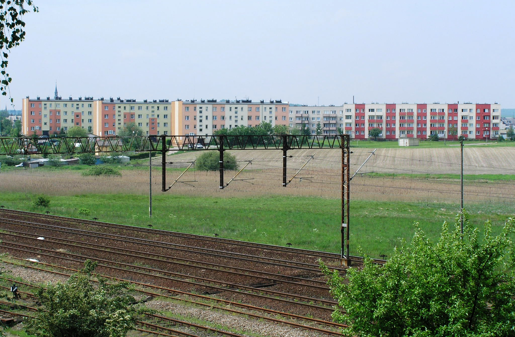 Osiedle Dworcowa